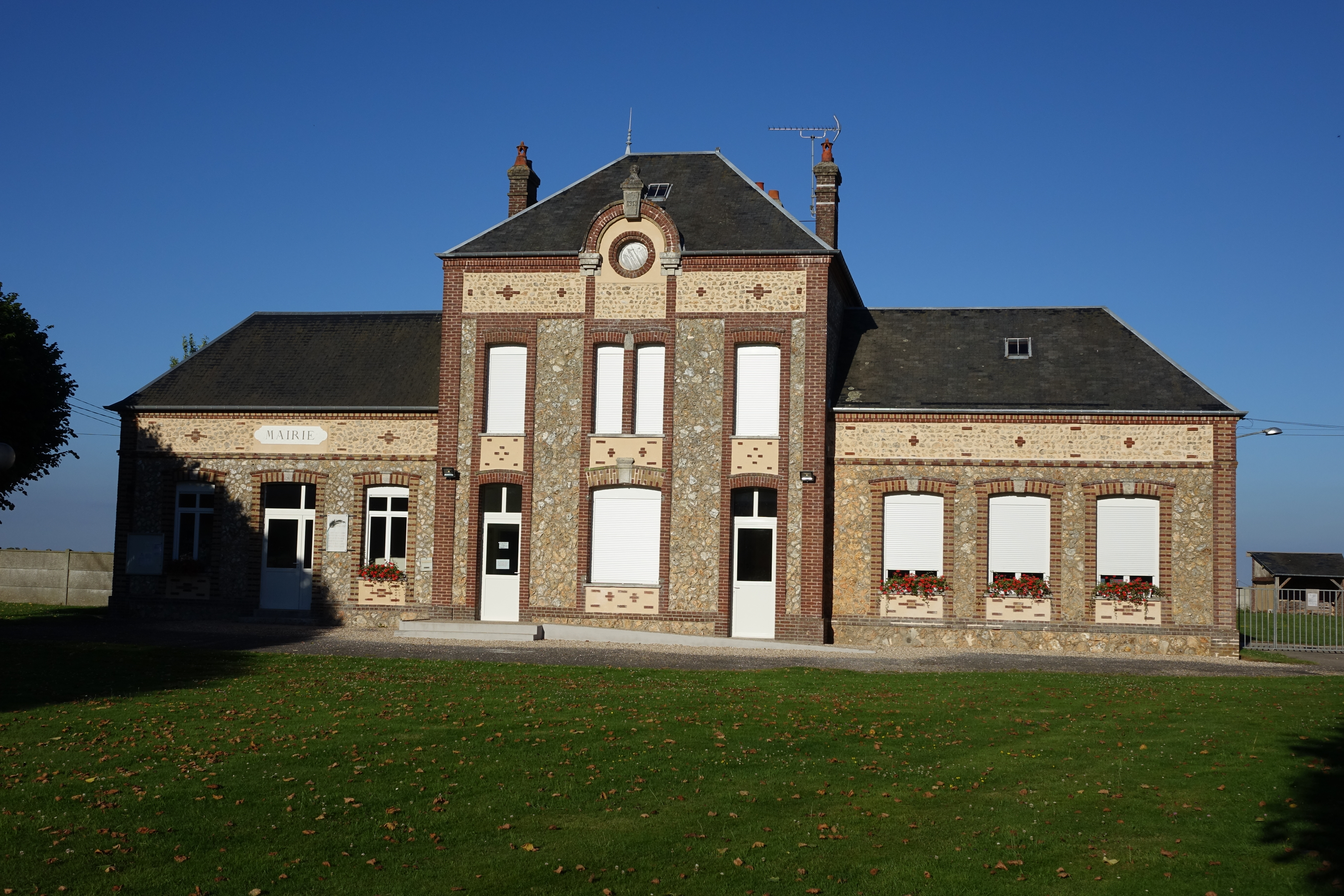 Mairie de Venon, Eure, France